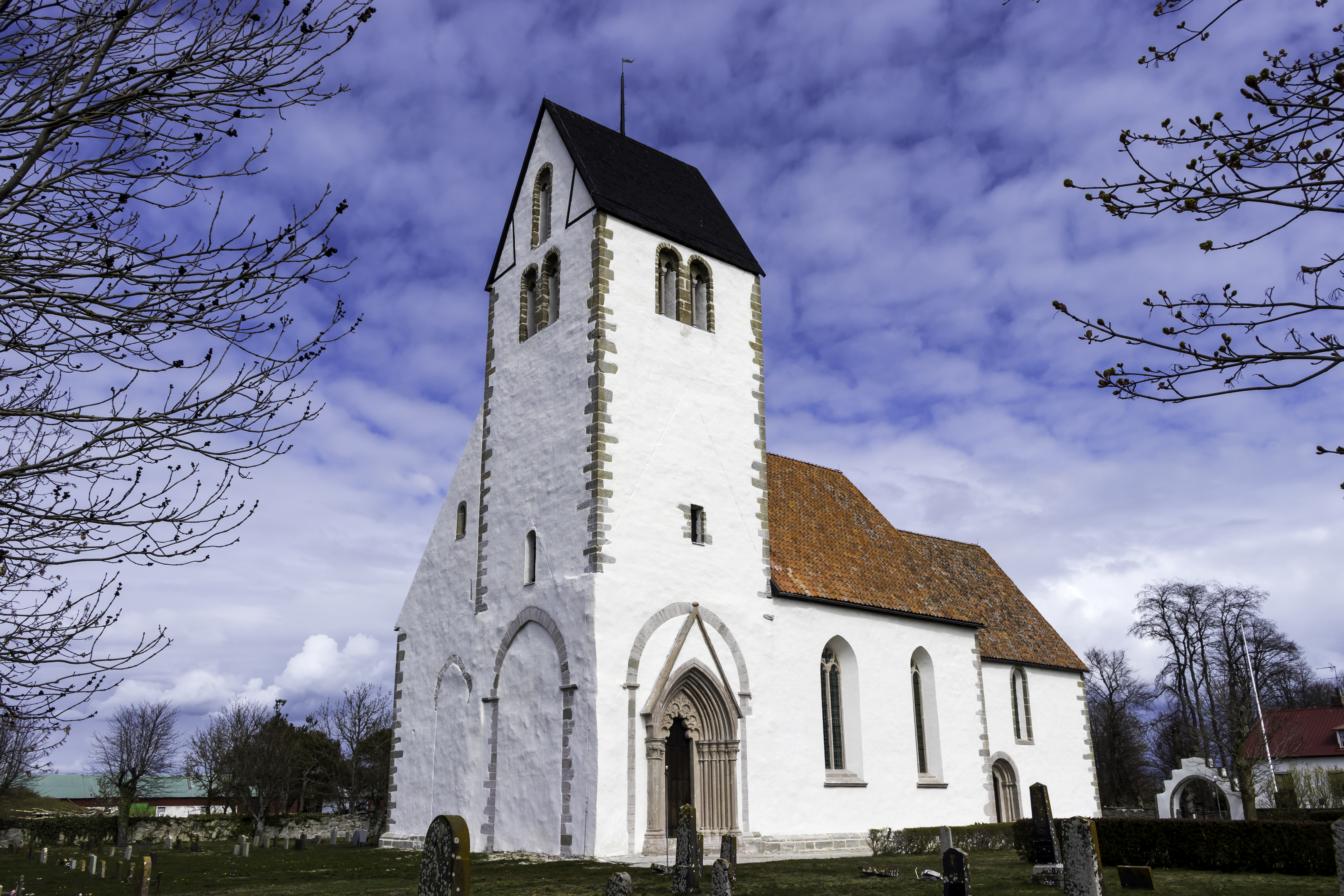 Igrexa de Hamra, na illa sueca de Gotland.